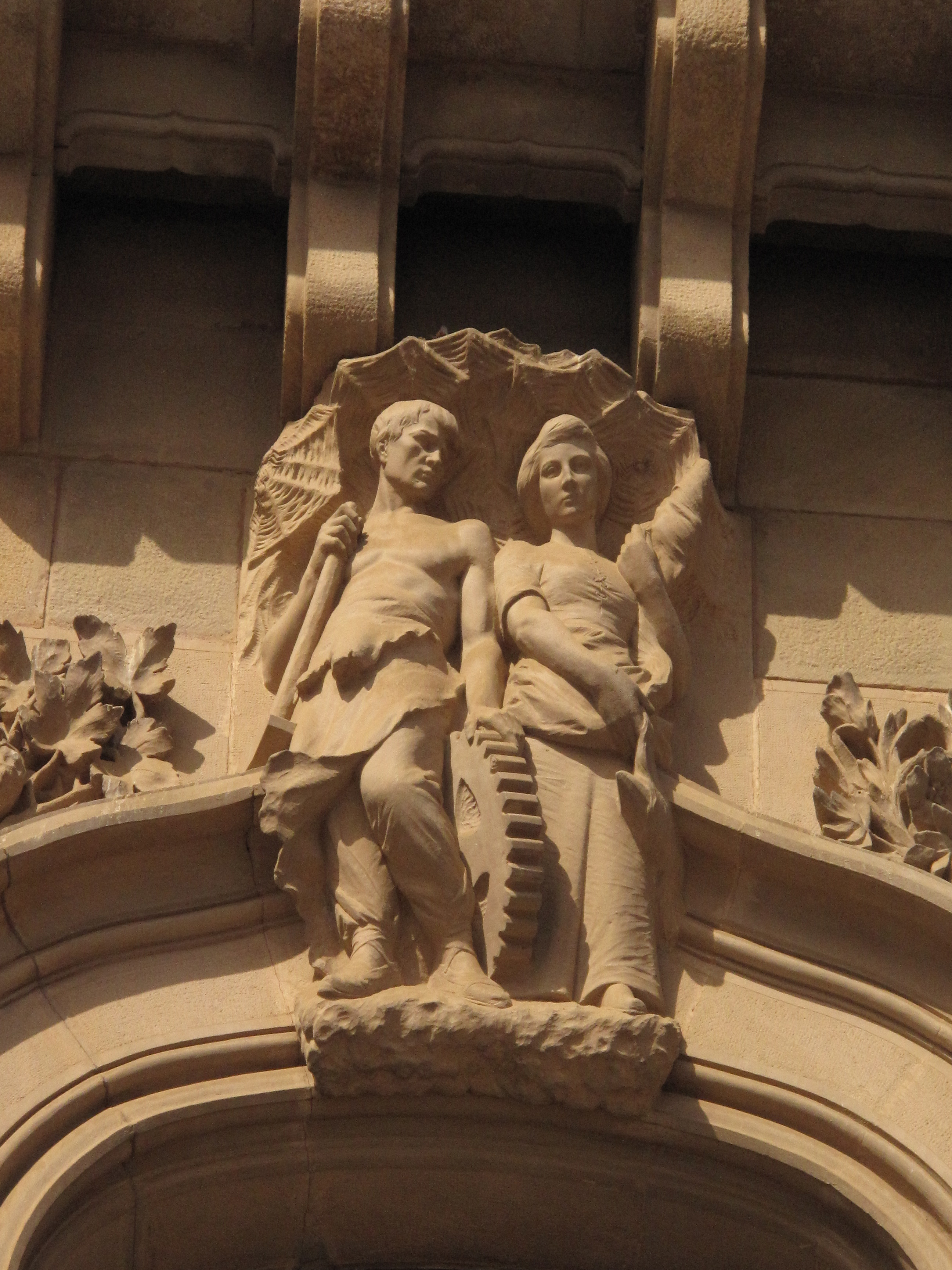 Nucli antic de Vic. Casa Costa. Escultura de la classe obrera